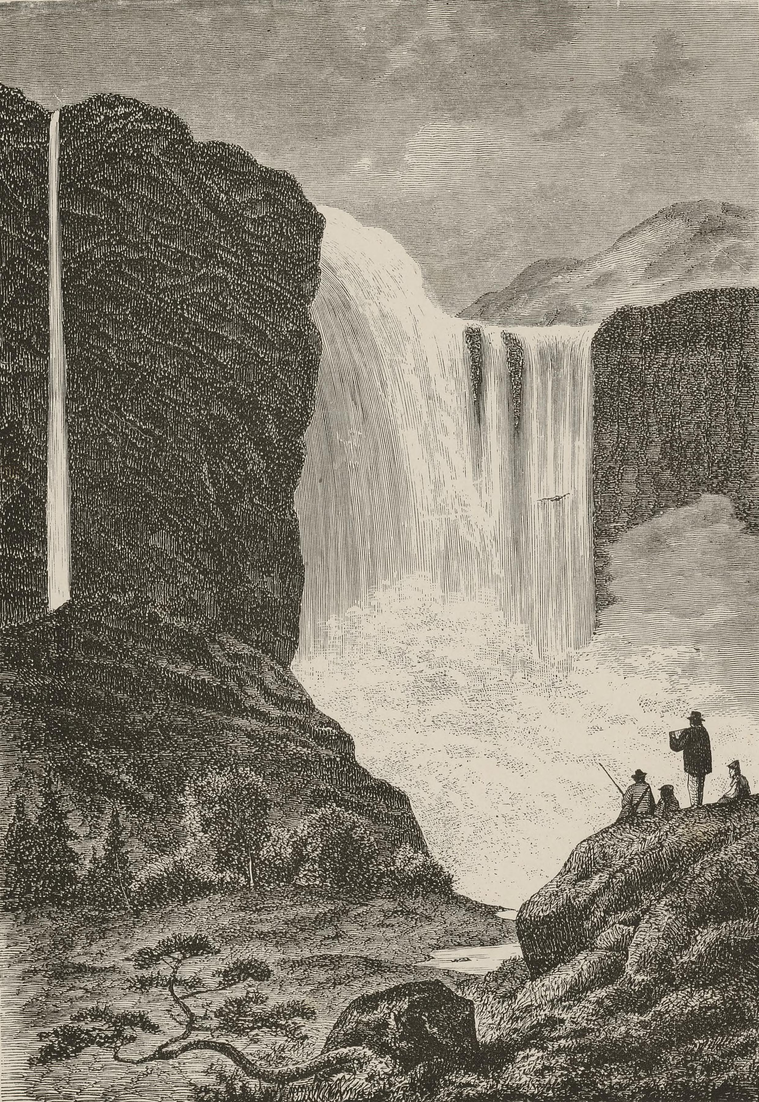 Illustrasjon hentet fra boken Nordiska taflor av ukjent forfatter og utgitt av Albert Bonnier (se, 1865)